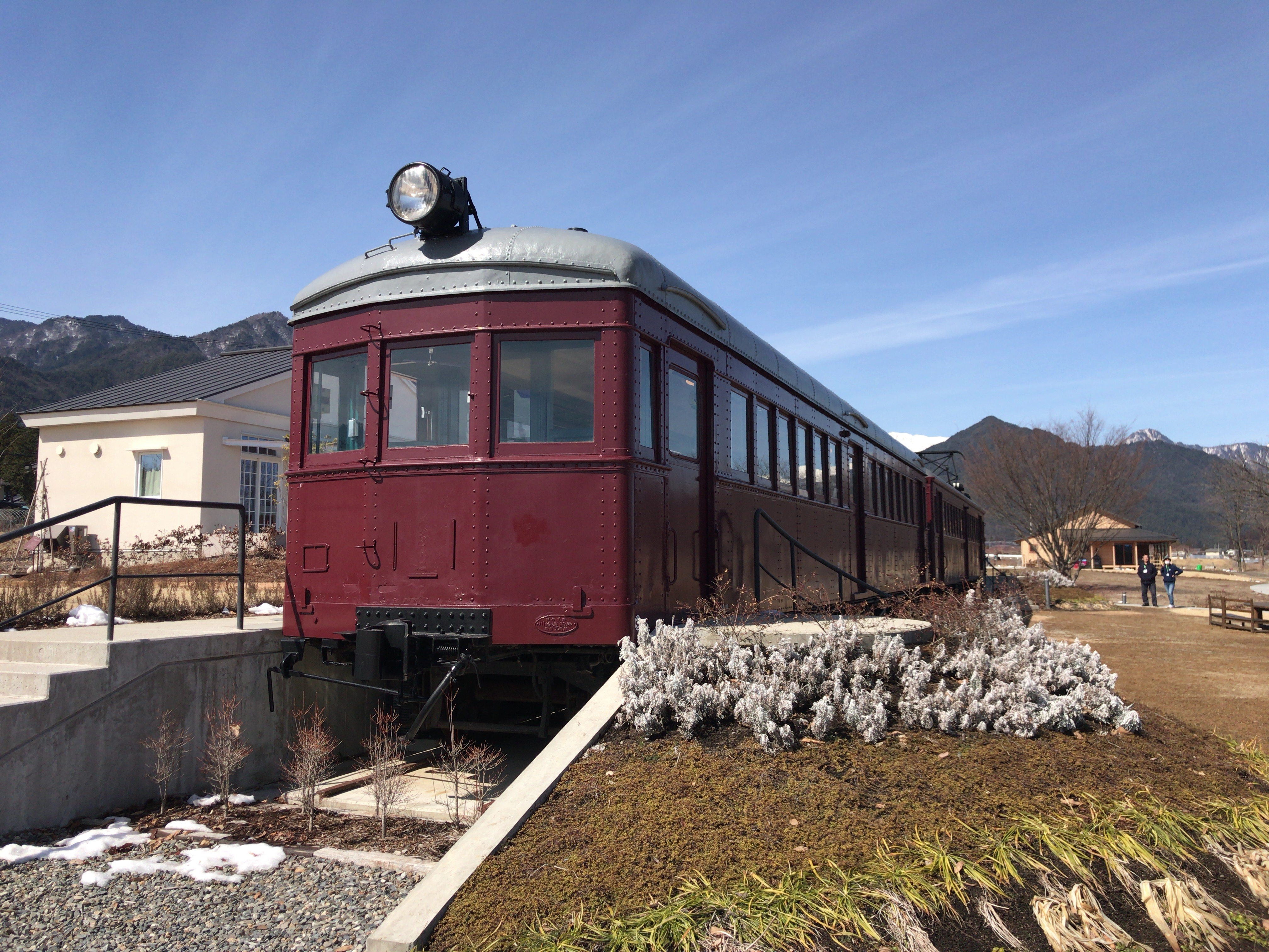 長野県北安曇郡松川村の、安曇野ちひろ公園内に設置された電車2両。